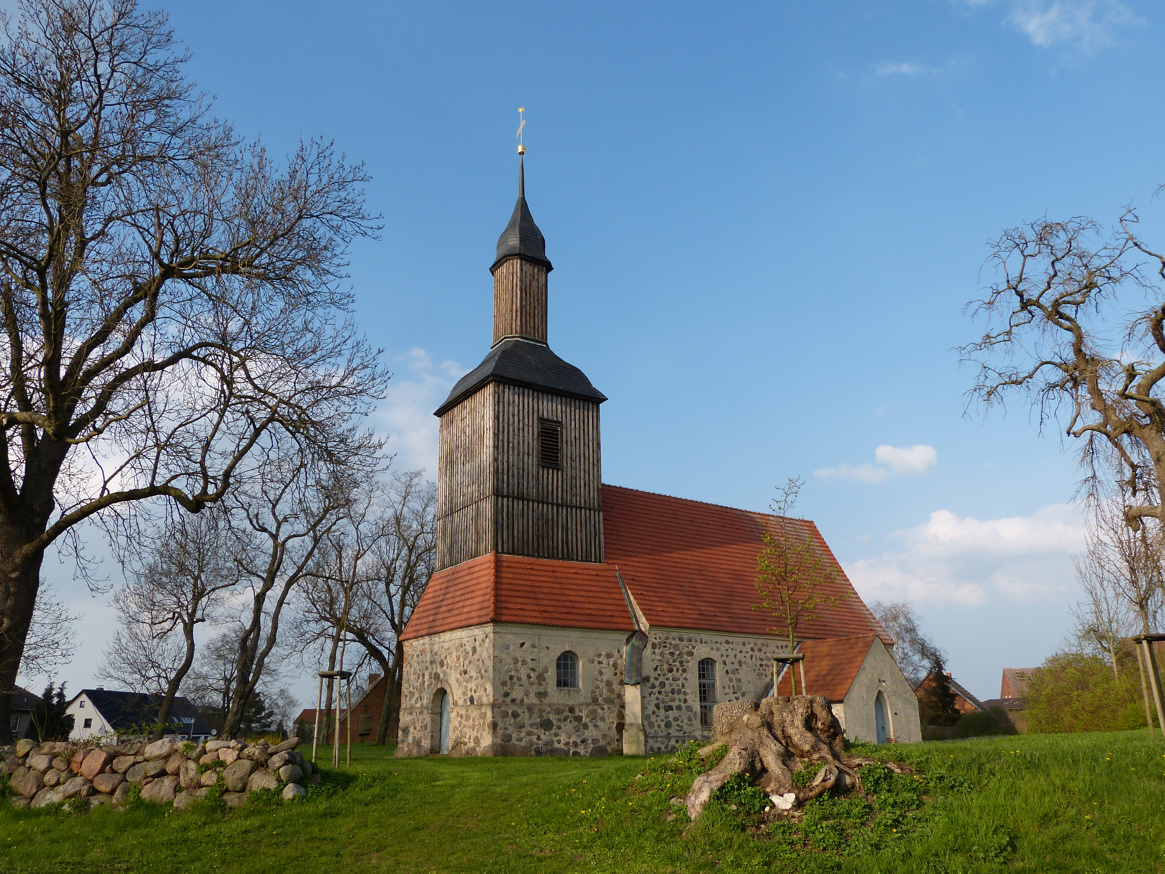 Kirche in Kölln, Gemeinde Werder bei Altentreptow, Südseite